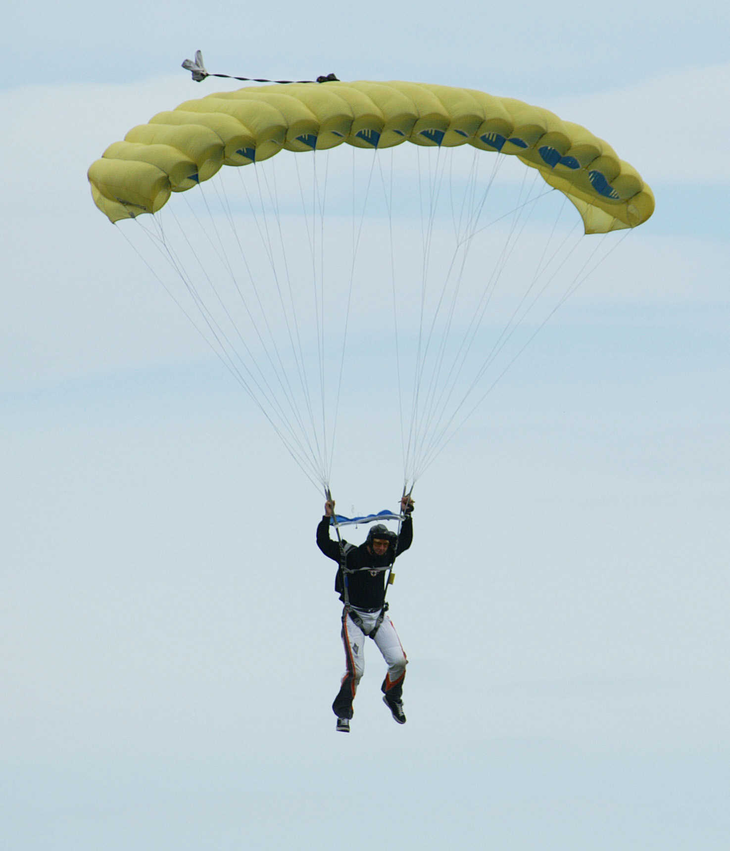 Fotografi av fallskärmshoppare, av Alers, Gryttjom, Tierps kommun, Uppland.